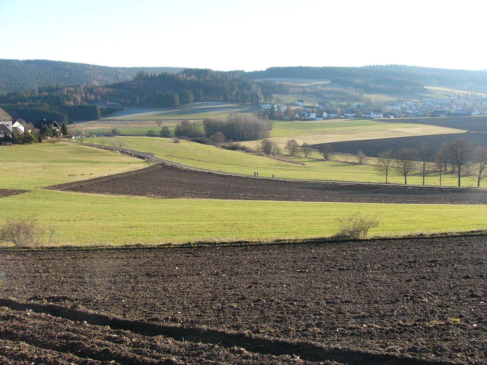 Ansicht der Orte Thierbach und Bobengrün im Froschbachtal